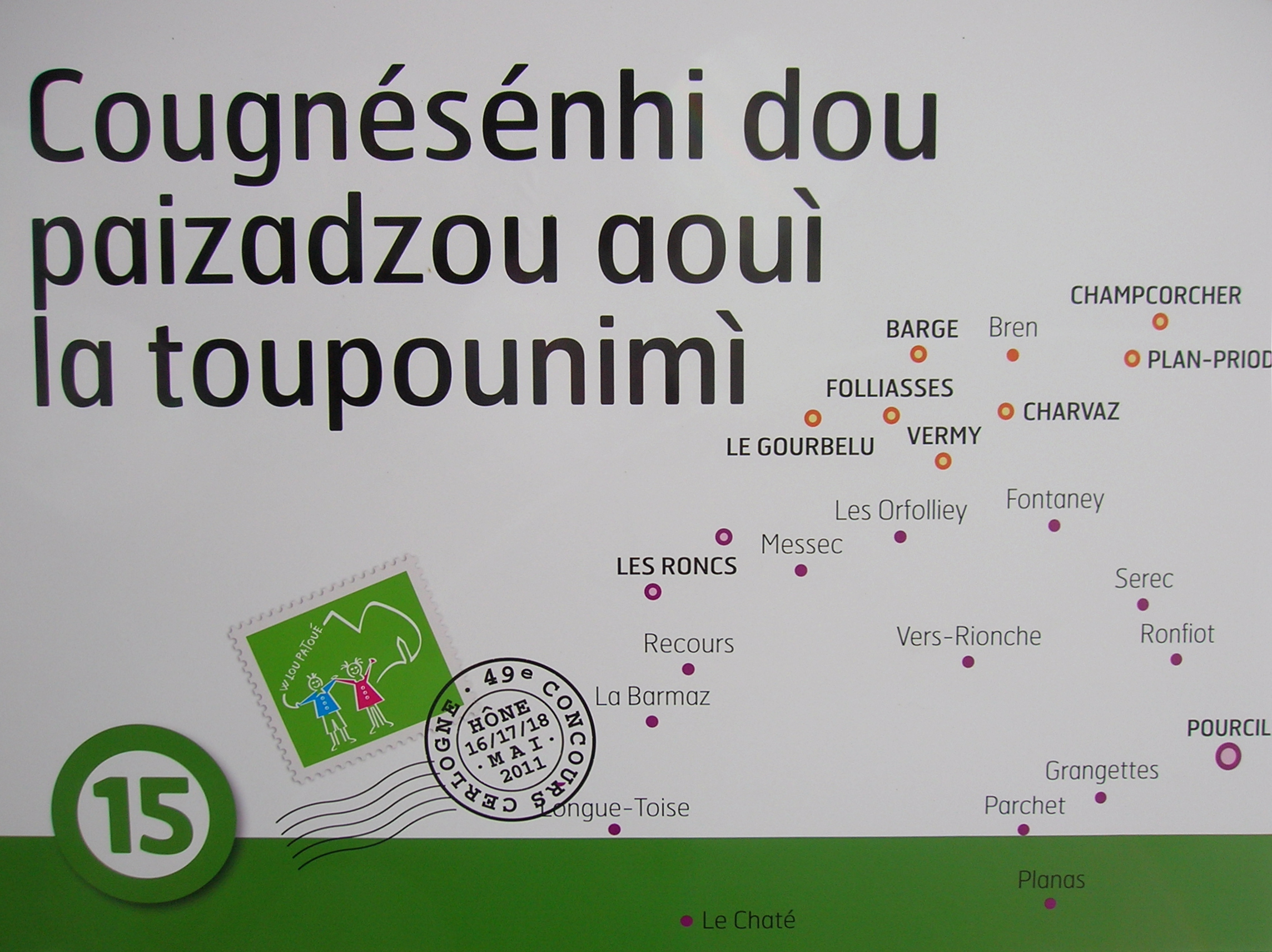 cartello in patois per il Concours Cerlogne. Hône, Valle d'Aosta, Italia.